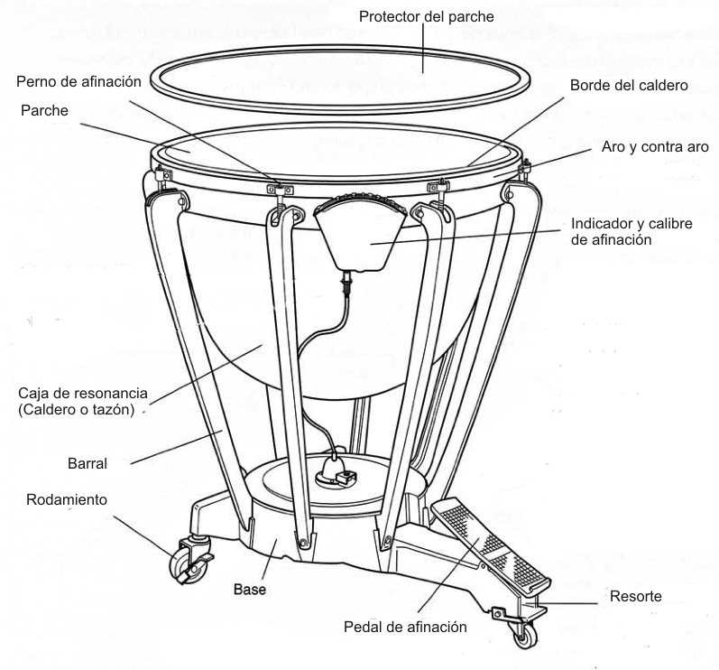 esquema de partes de un timbal